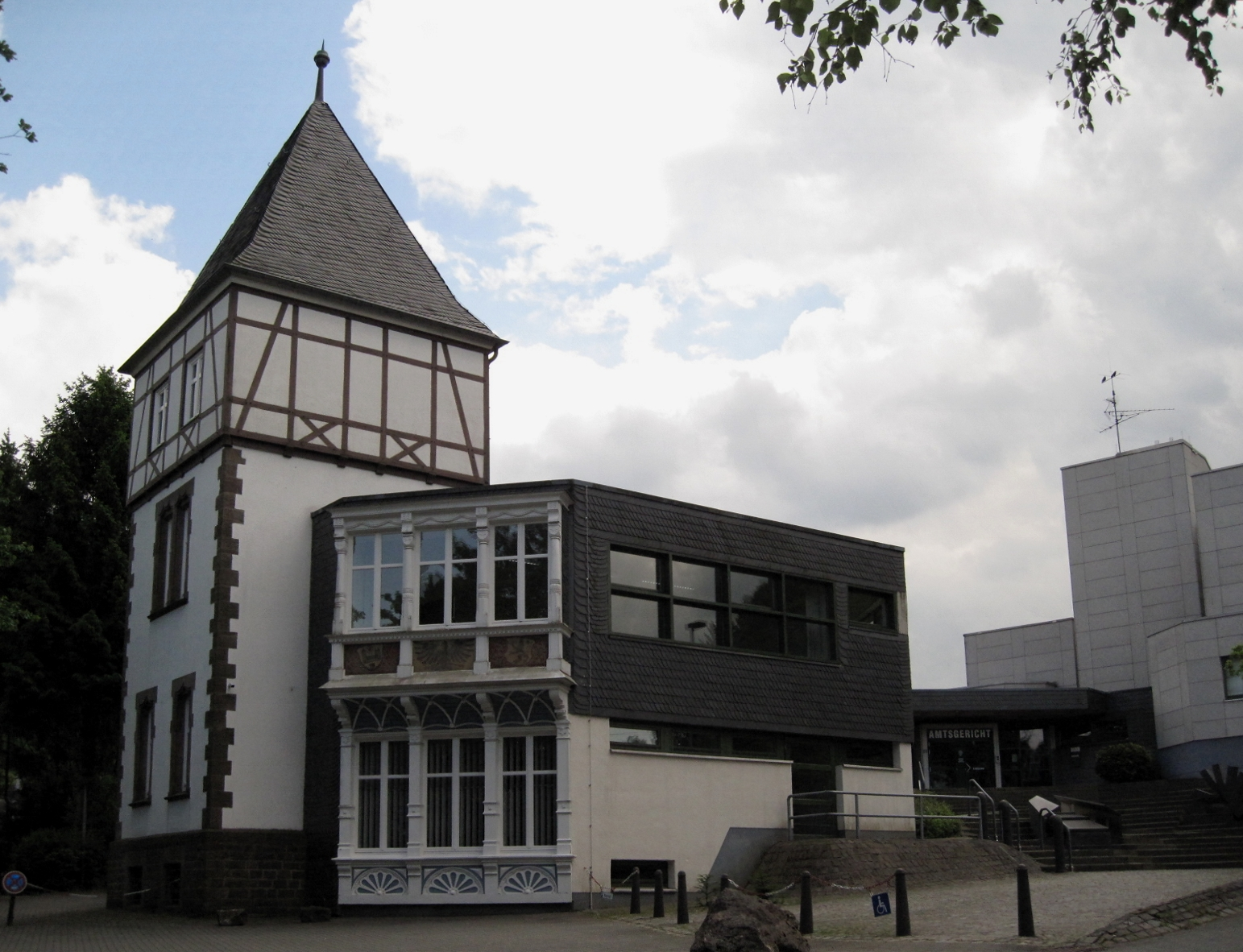 Amtsgericht Wipperfürth in Wipperfürth, Gaulstraße 22. Der alte Turm und das Fensterelement mit den Holzschnitzereien und -malereien des alten Landratsamtes (ab 1933 Amtsgerichtsgebäude) wurde in den im November 1983 fertiggestellten Neubau integriert.